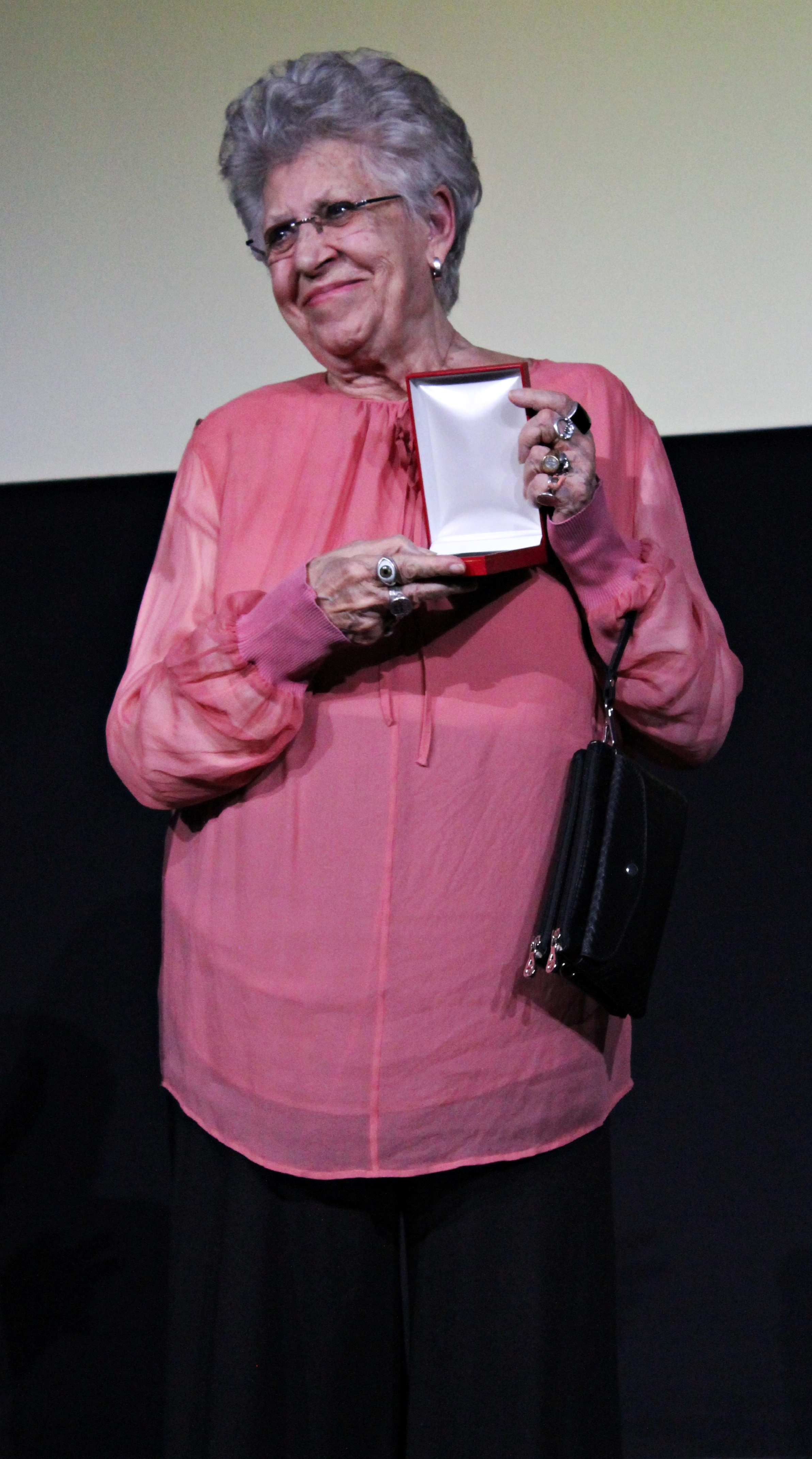 La actriz española Pilar Bardem muestra la Medalla de honor del Círculo de Escritores Cinematográficos recibida en la 74.ª edición.